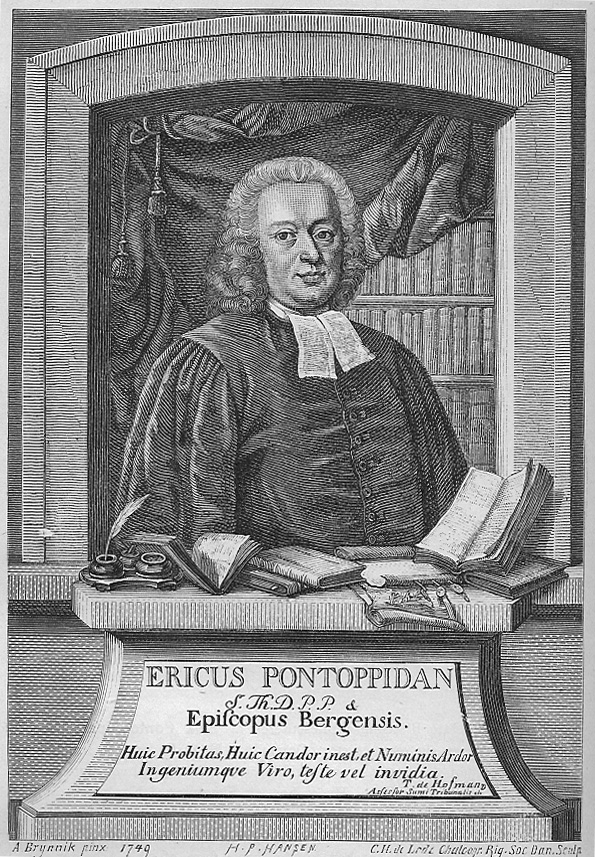 Erik Pontoppidan den Yngre